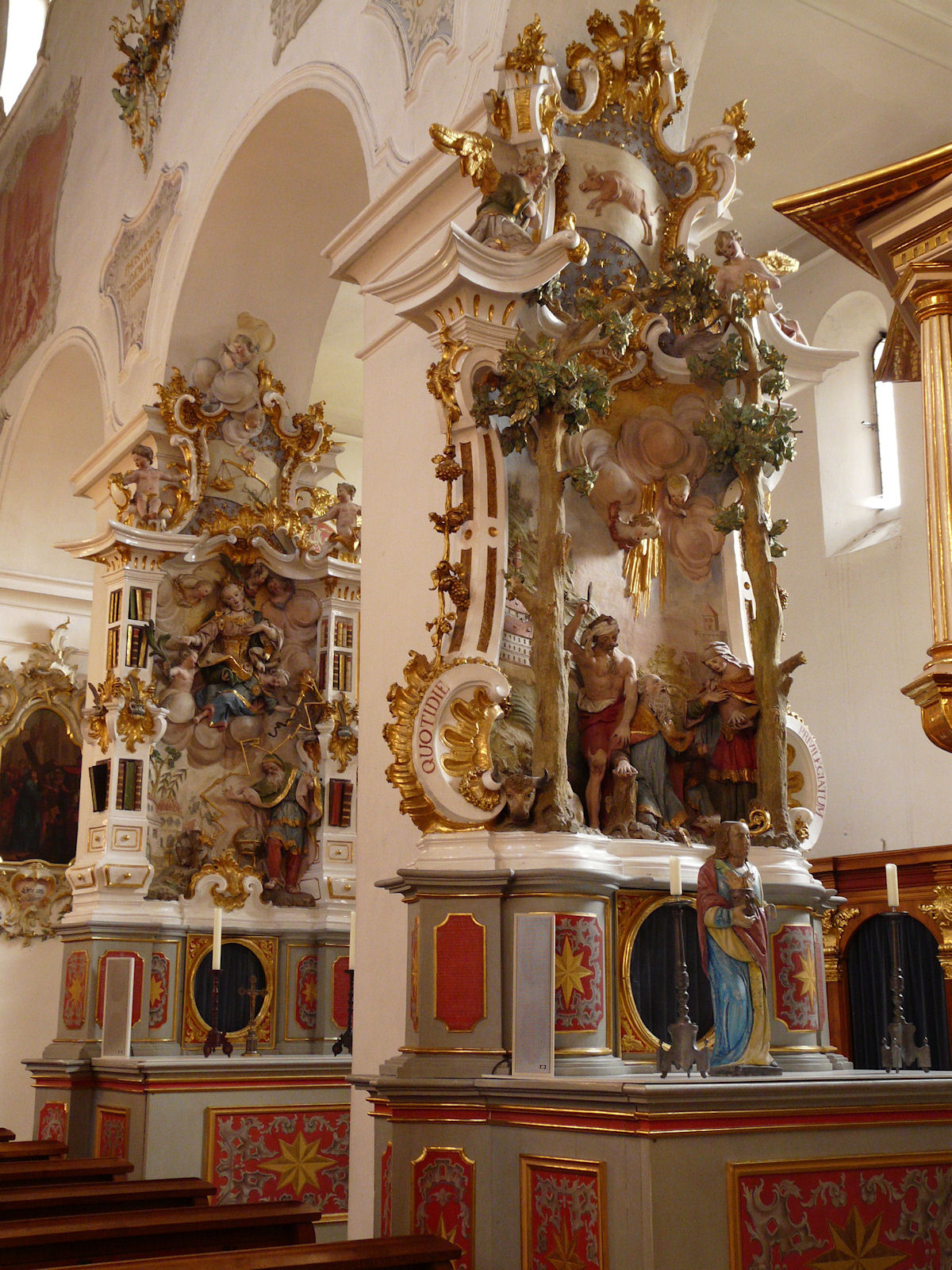 Kloster Windberg, Windberg, Niederbayern, Deutschland Windberg Abbey, Windberg, Bavaria, Germany